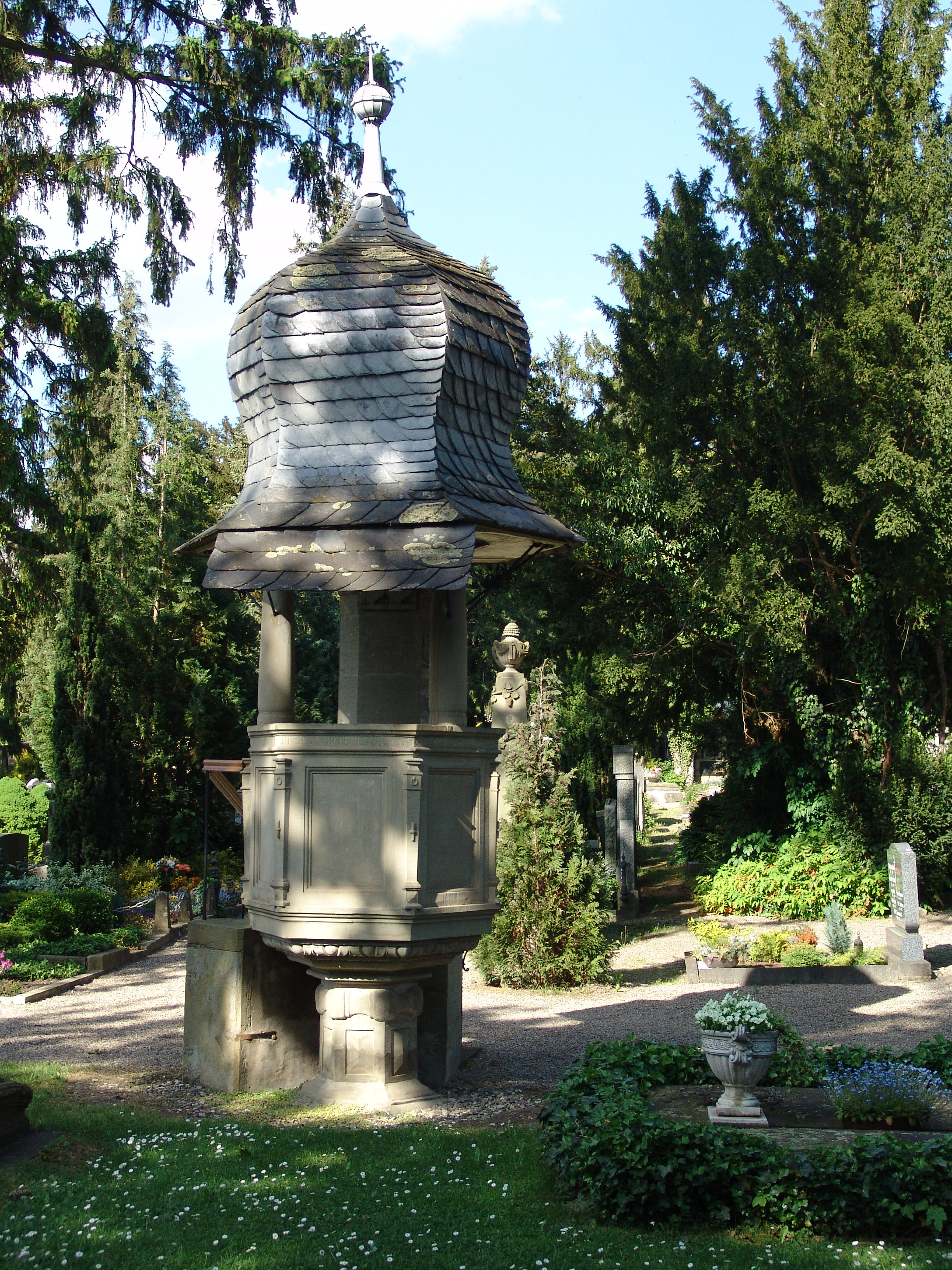 Kanzel auf dem Friedhof in Mainbernheim